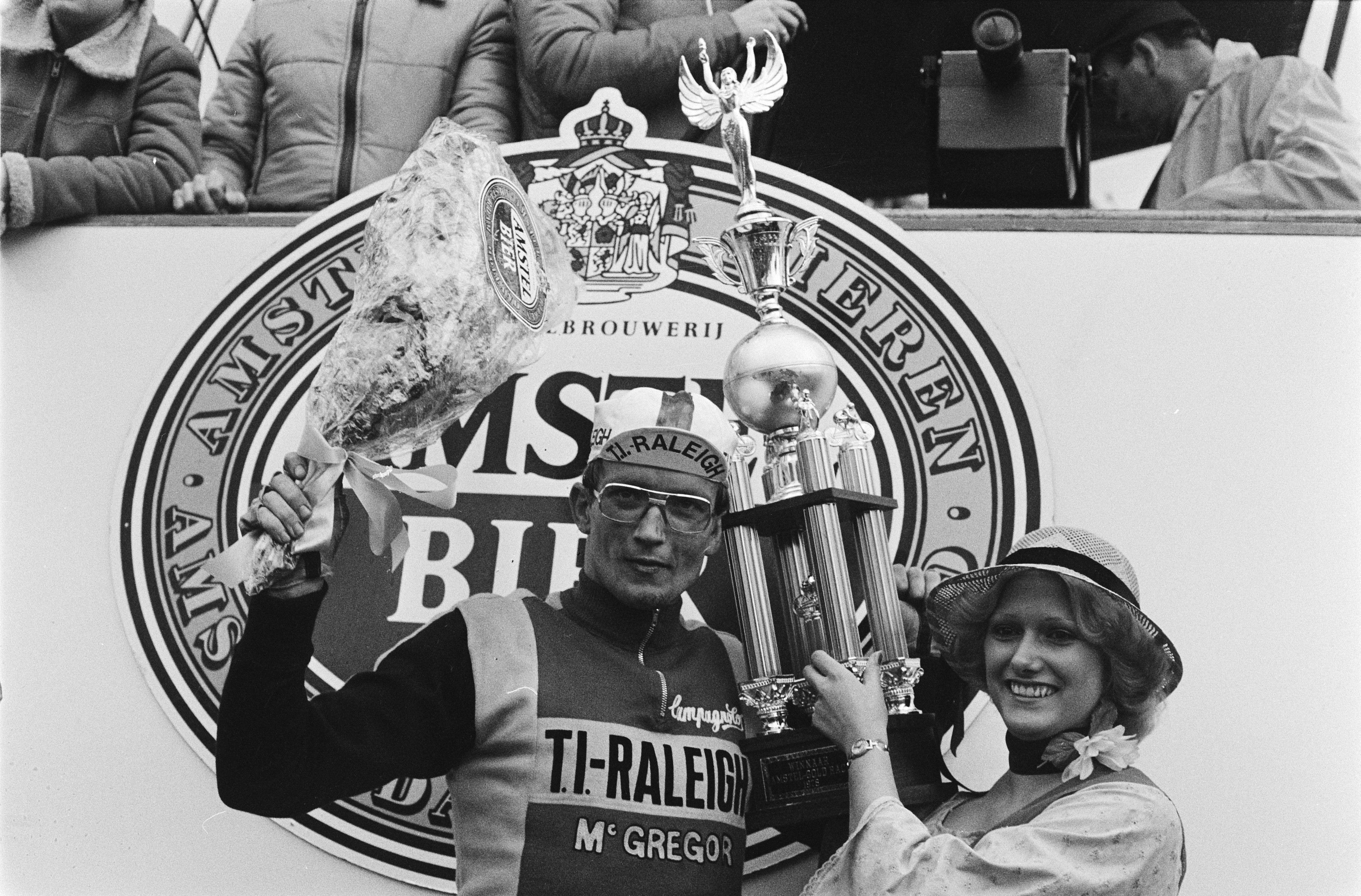 Collectie / Archief : Fotocollectie Anefo Reportage / Serie : [ onbekend ] Beschrijving : Amstel Gold Race wielrennen; winnaar Jan Raas met bloemen Datum : 27 maart 1978 Trefwoorden : Wielrennen, Winnaars Persoonsnaam : Amstel Gold Race Fotograaf : Verhoeff, Bert / Anefo Auteursrechthebbende : Nationaal Archief Materiaalsoort : Negatief (zwart/wit) Nummer archiefinventaris : bekijk toegang 2.24.01.05 Bestanddeelnummer : 929-6433